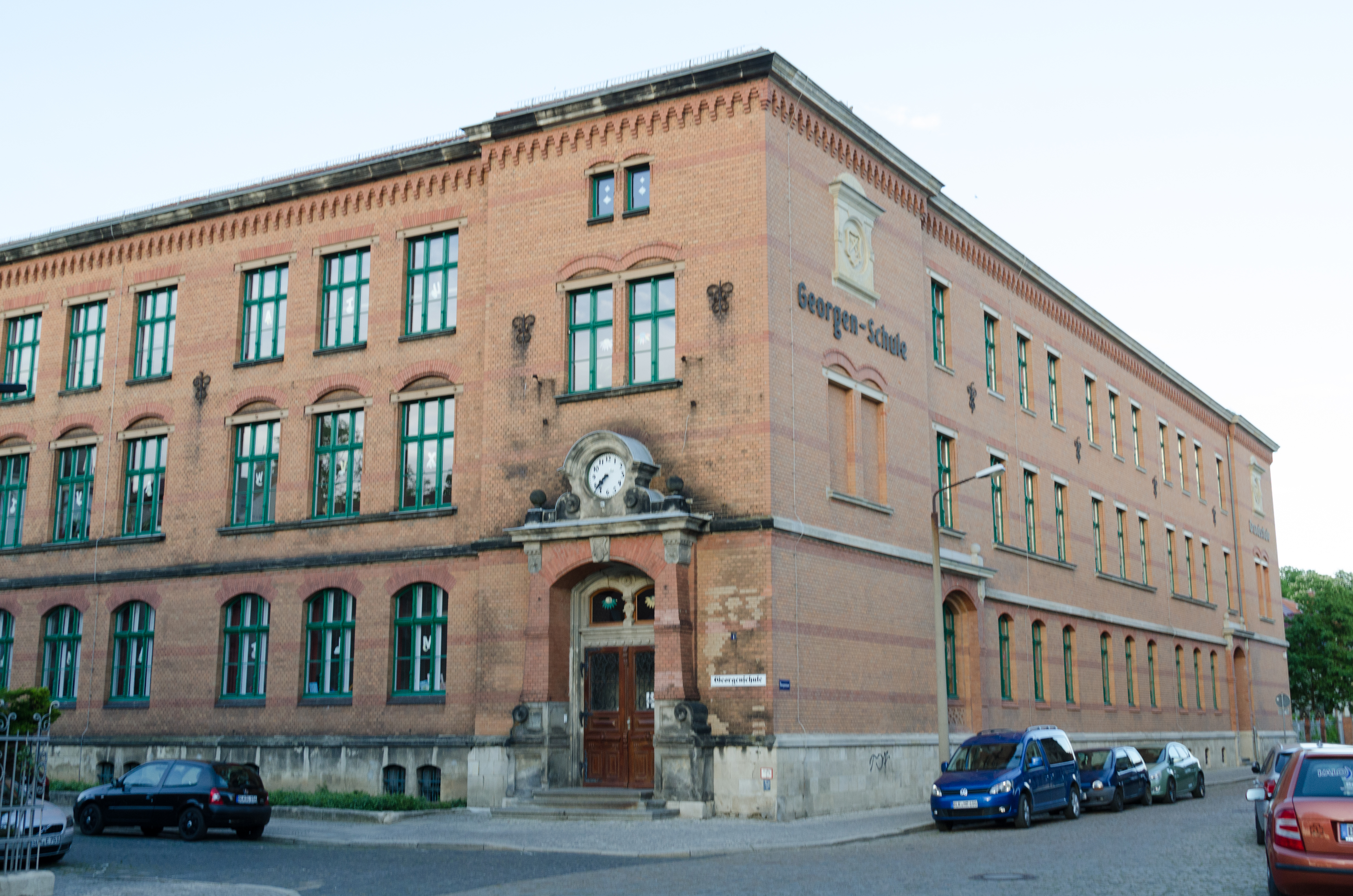 Naumburg, Wilhelm-Wagner-Straße 1